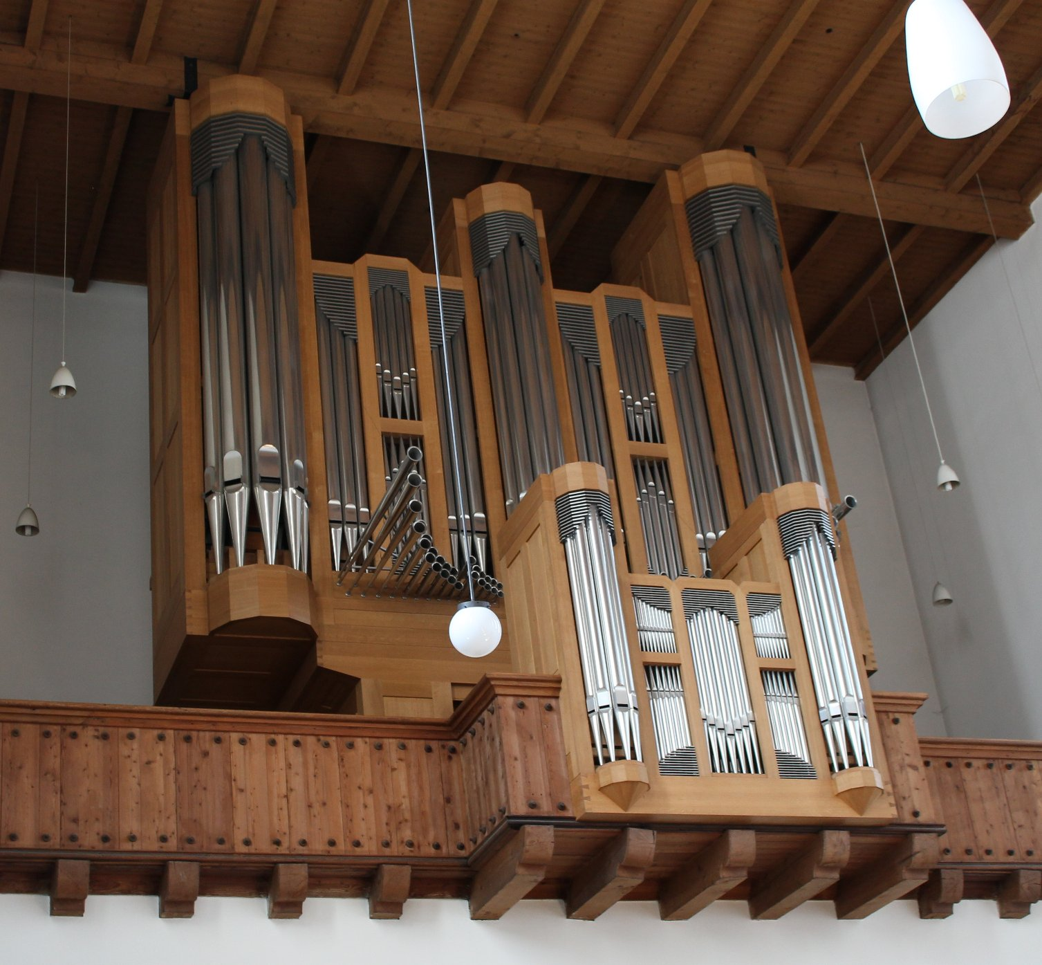 Orgel der Pfarrkirche Heilige Familie in München-Harlaching (1992 von Riegner & Friedrich, III/52)